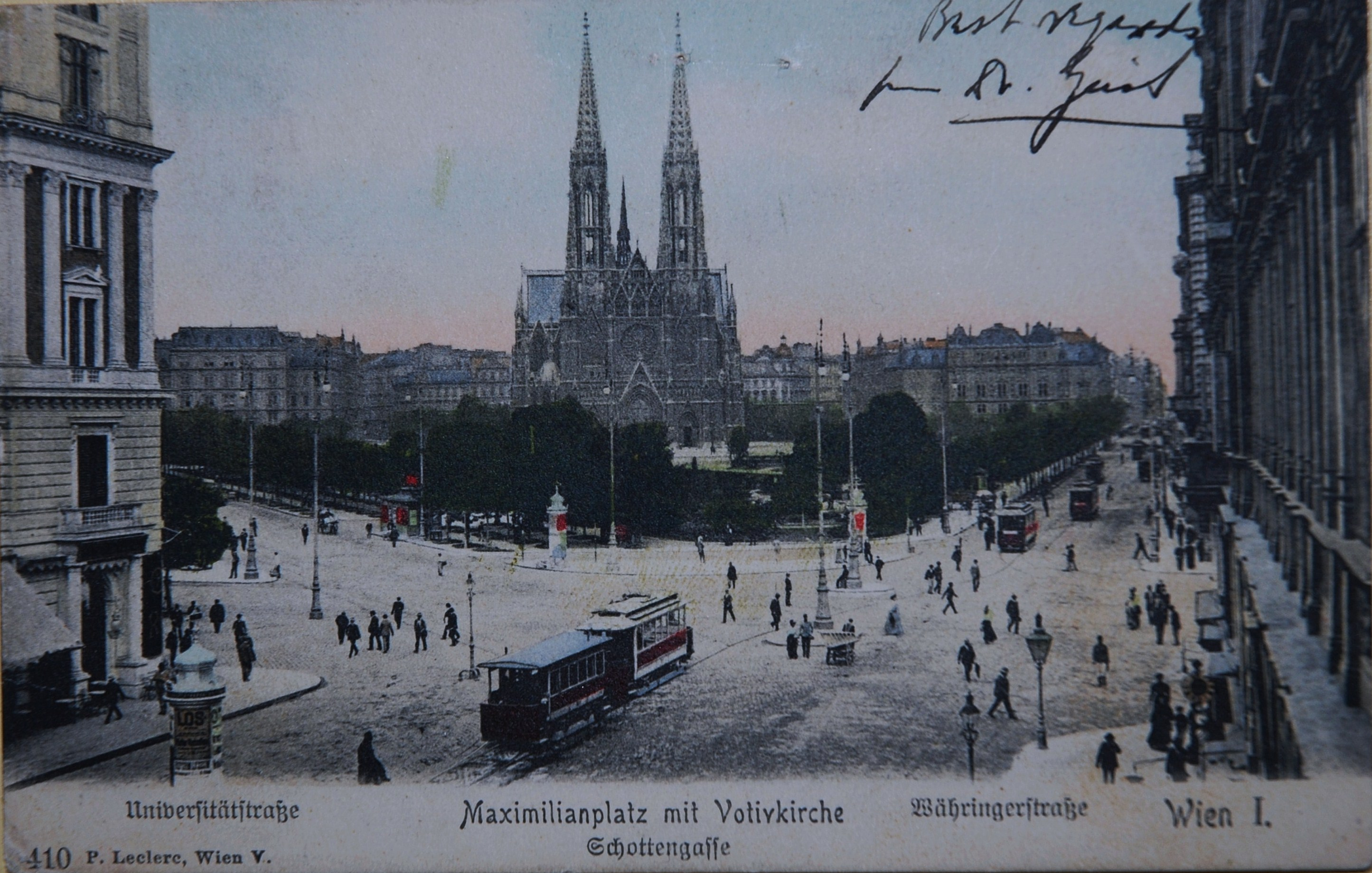 "Correspondenz-Karte" datiert mit Briefmarke vom 15. April 1908